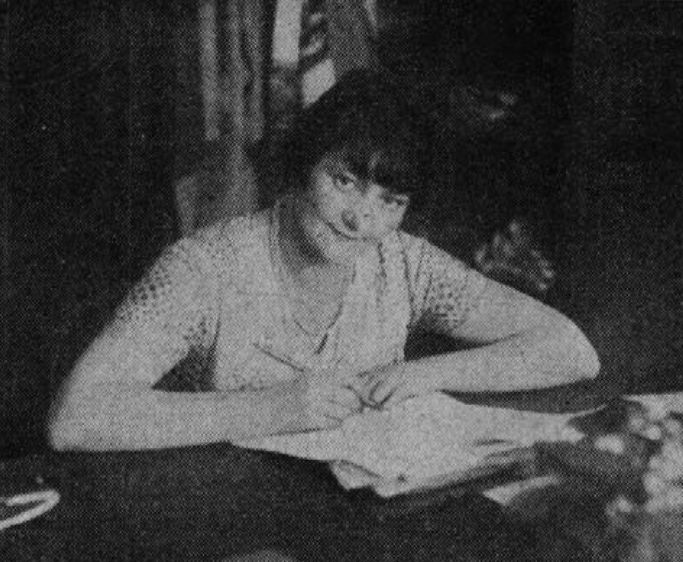 Mednyánszky Mária tizennyolcszoros világbajnok asztaliteniszezőnő